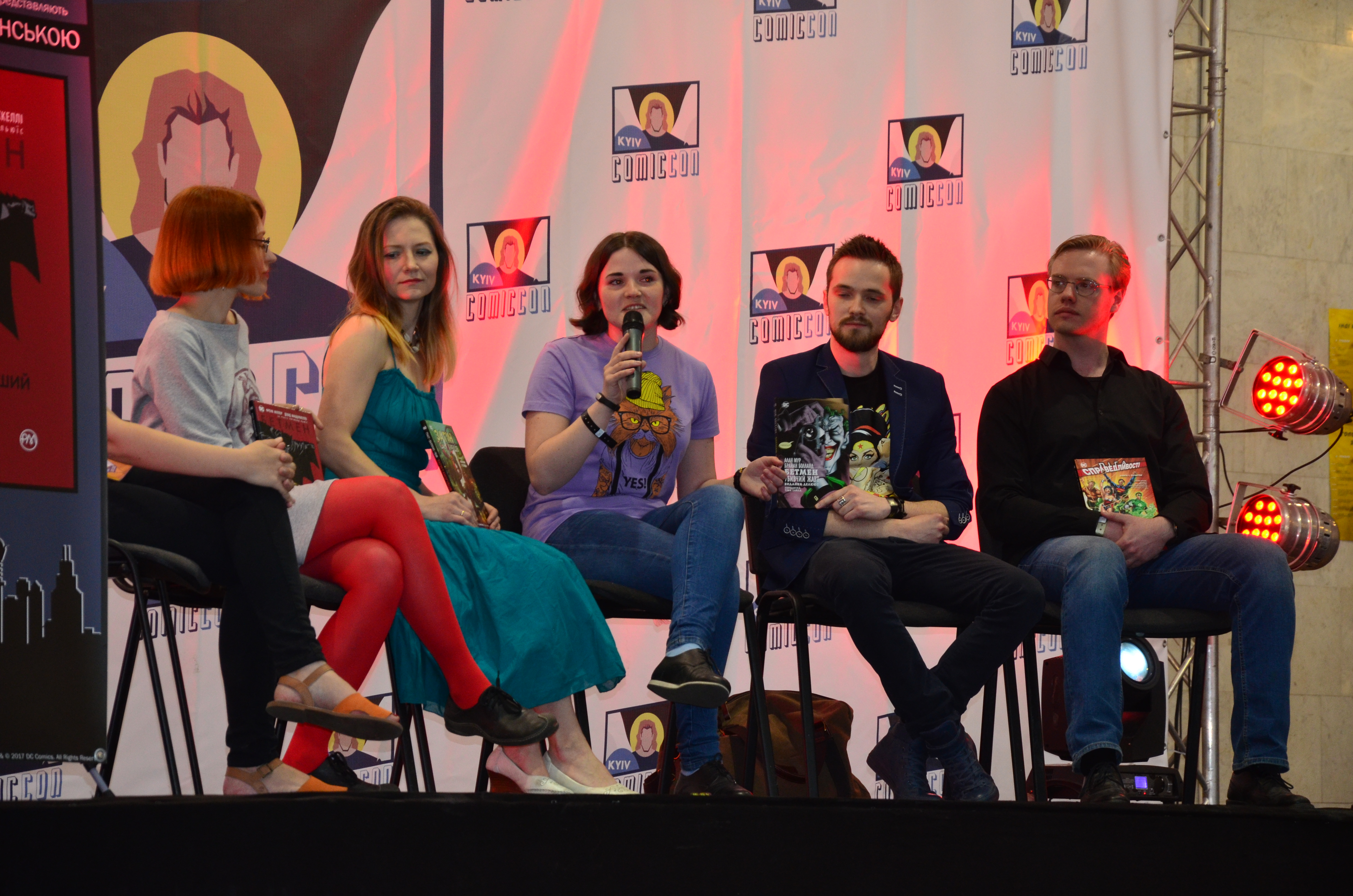 6 та 7 травня в Українському Домі по вулиці Хрещатик, 2 у Києві відбувся фестиваль Comic Con.